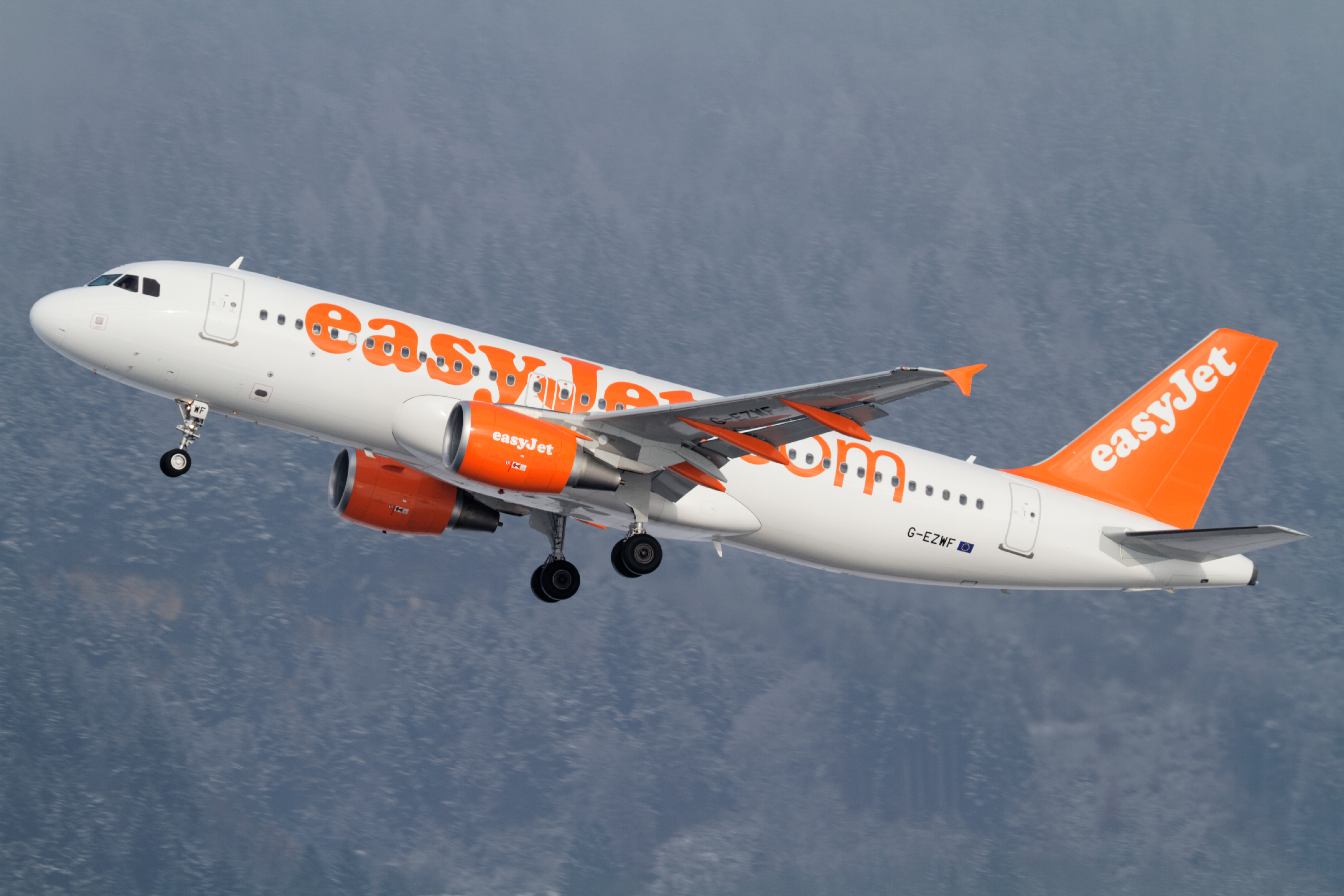 Easyjet-Flugzeug am Flughafen Innsbruck